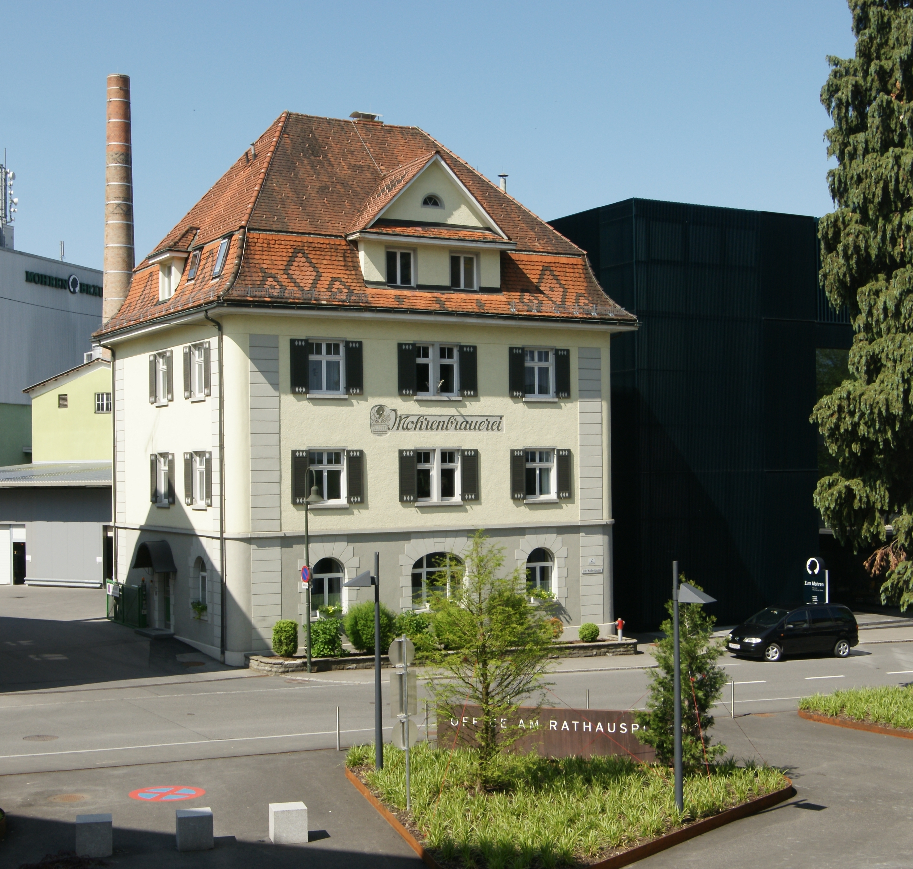 Mohrenbrauerei August Huber an der Dr. Waibel Straße in Dornbirn.